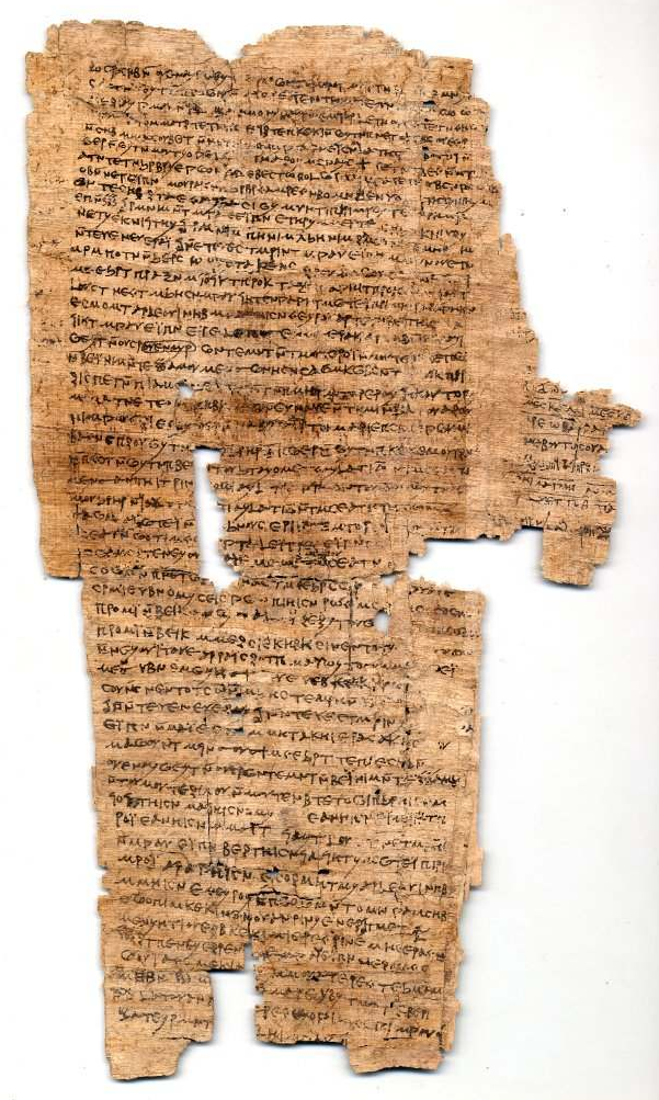 Papirus z Oksyrynchos przechwywany w Muzeum Brytyjskim (BM 10808), II wiek n.e. Unknown